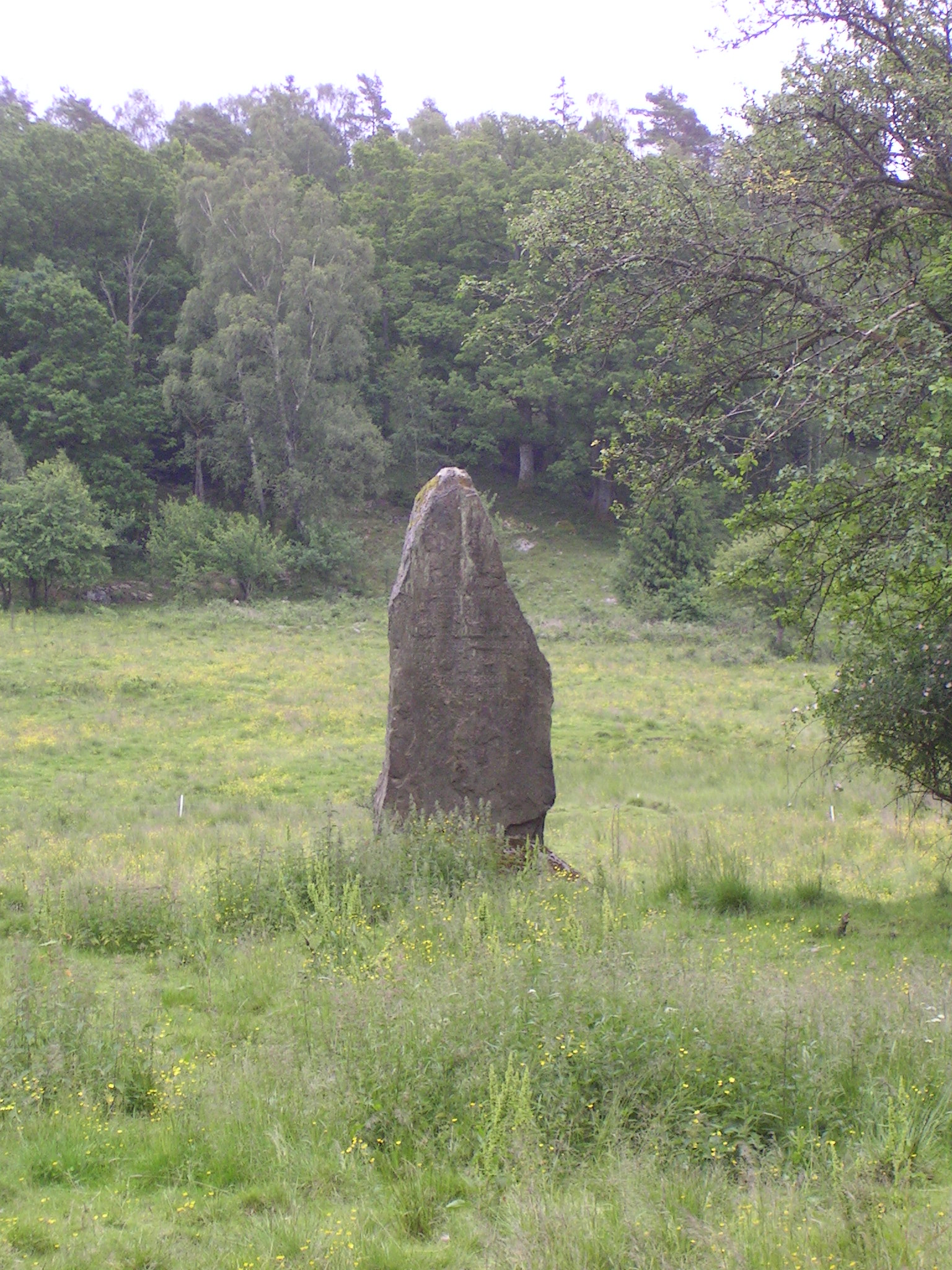 Sten som markerar stilleståndsavtalet mellan Sverige och Danmark i Kungsäter 1471.